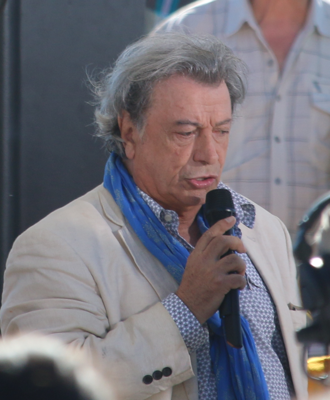 Hervé Vilard à Bourg-en-Bresse le 17 juillet 2016